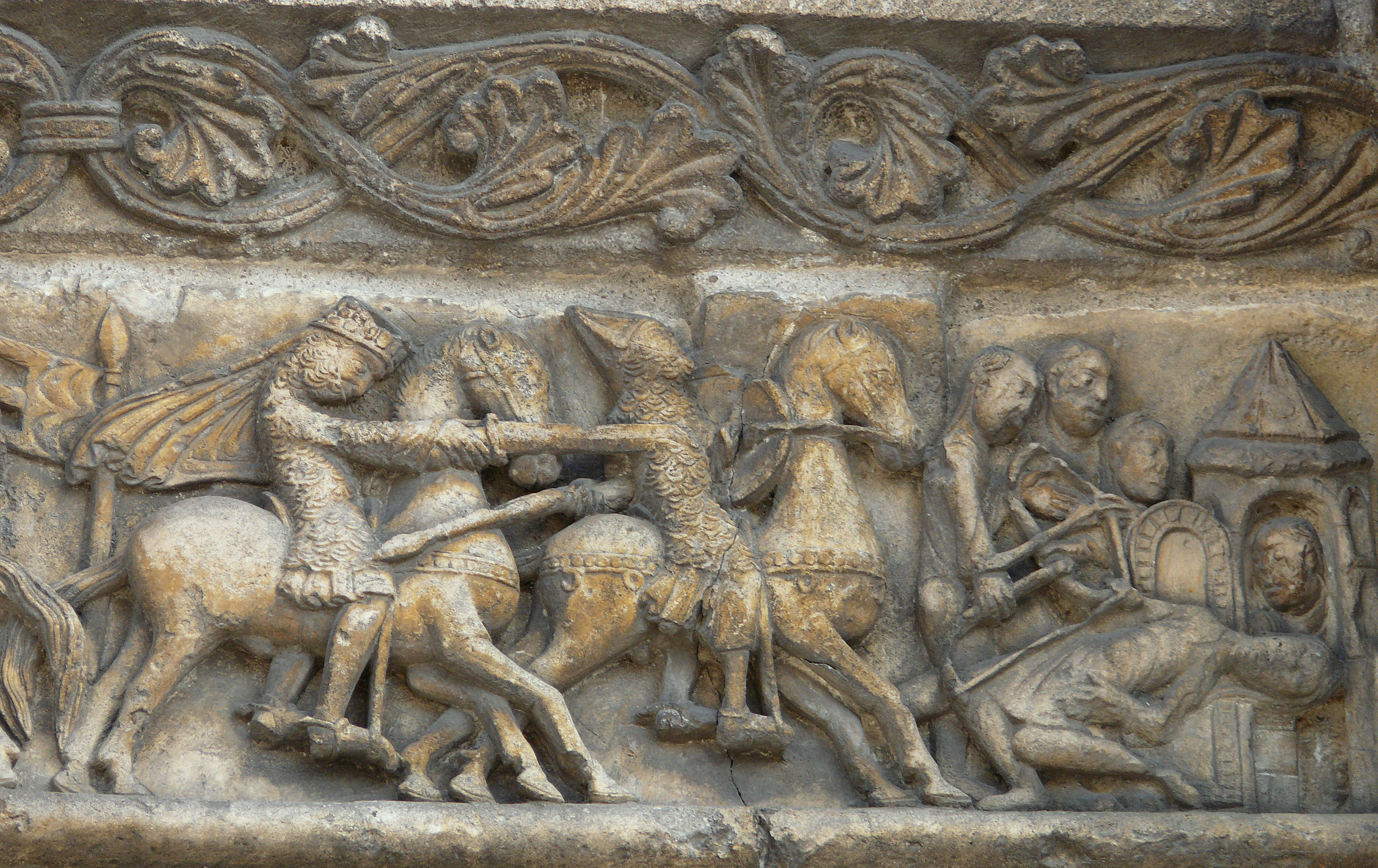 Angoulême - Cathédrale Saint-Pierre - Chanson de Roland (détail 2)